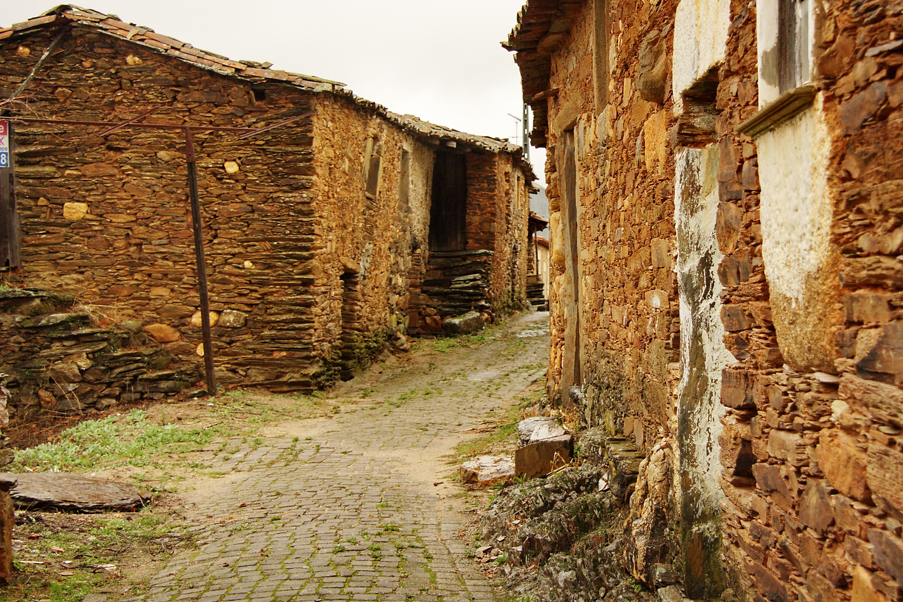 Rua de Martim Branco